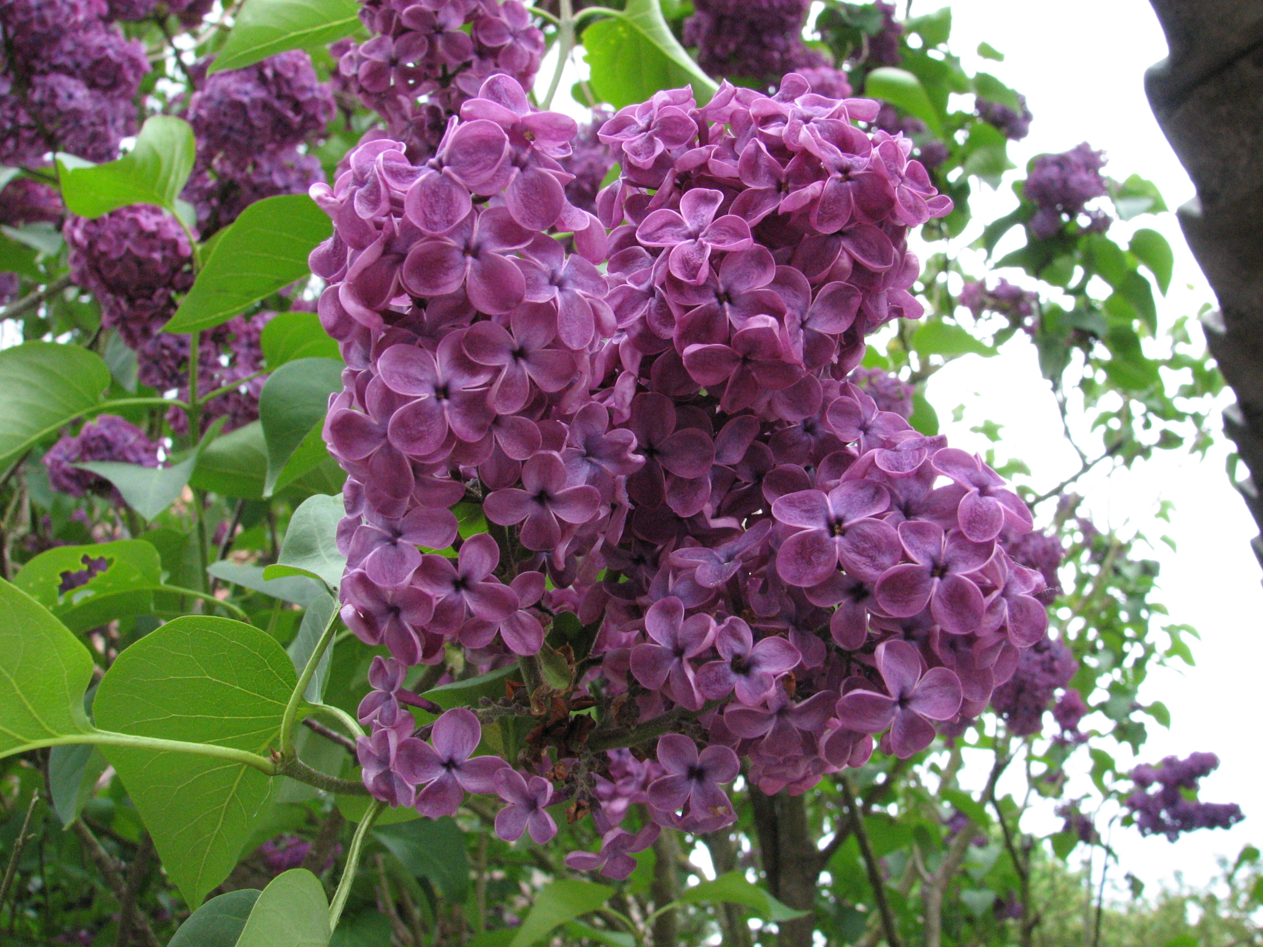 Gemeiner Flieder am Neckar